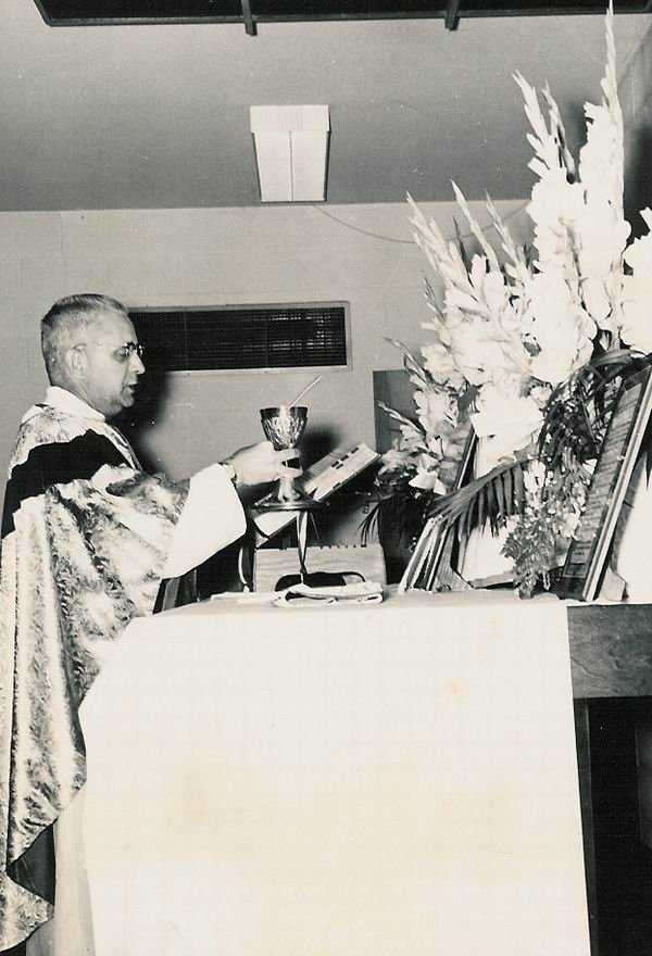 Offertoire en rite tridentin